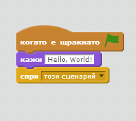 Hello, World! на Скрач